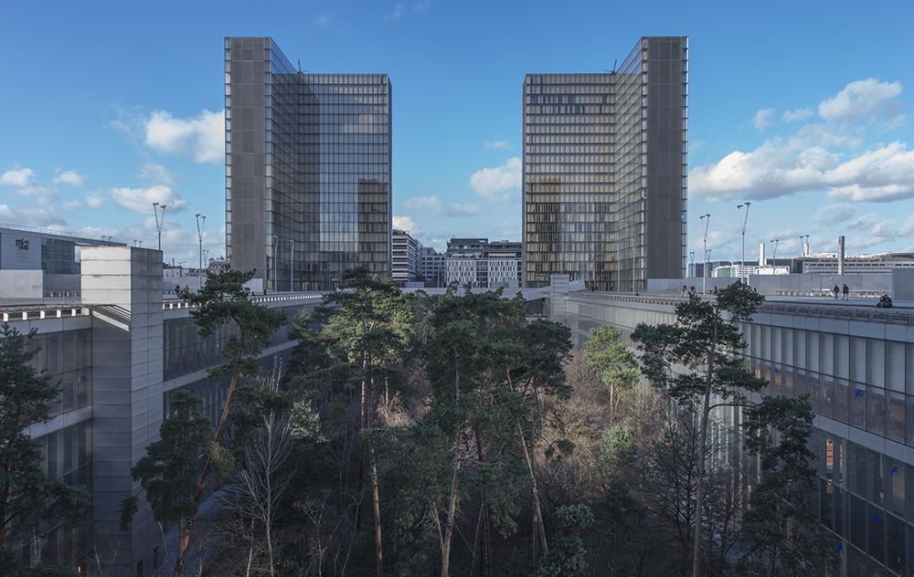 B.N.F. inauguré en 1995